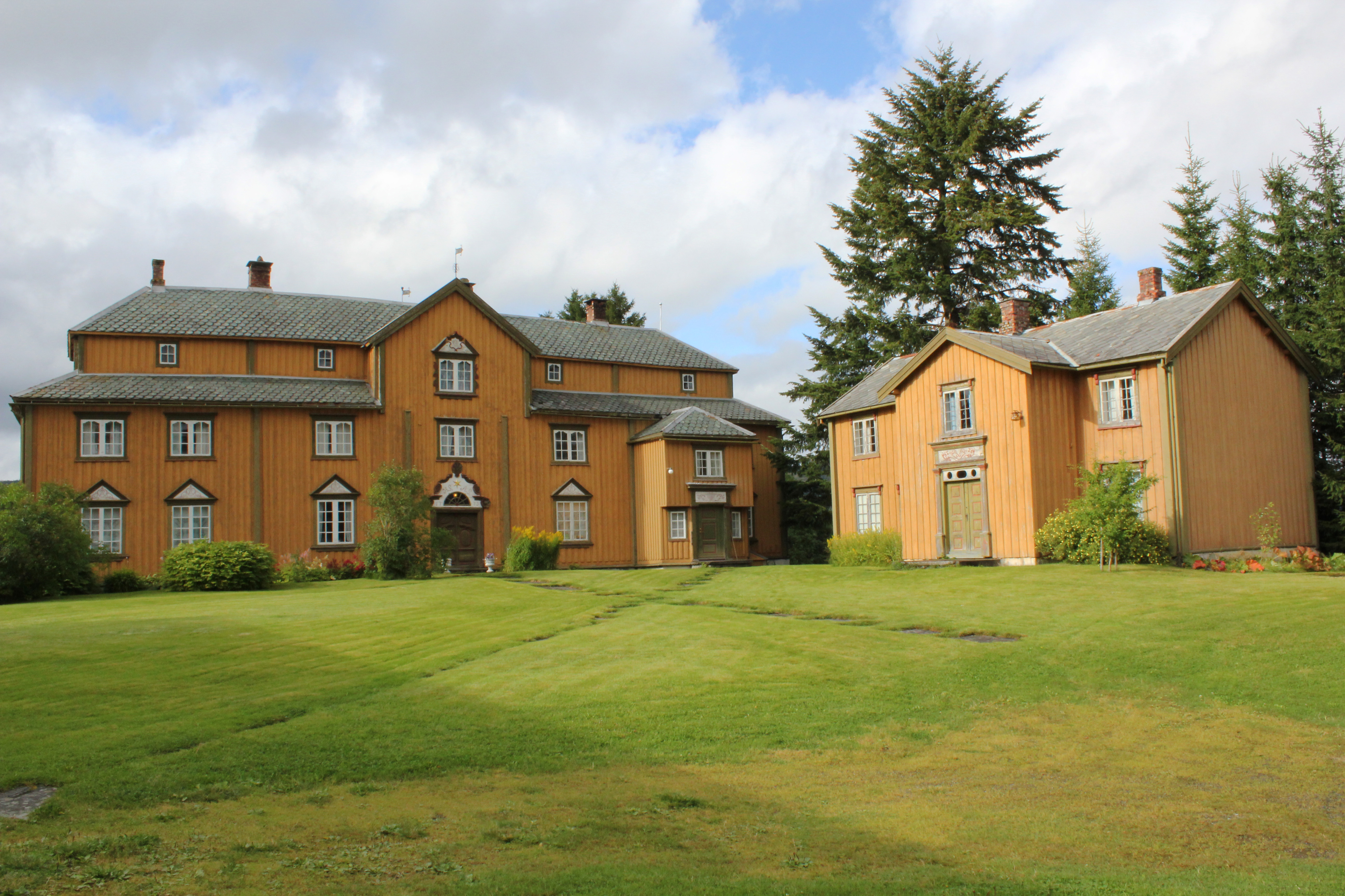 Gjesvold/Gjesvål gård, Orkdal. Hovedbygningen fra 1773. Våningshusene sett fra sør